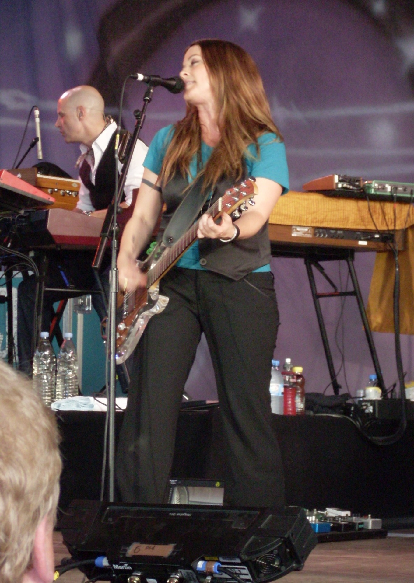 Alanis Morissette live in Köln, 2008